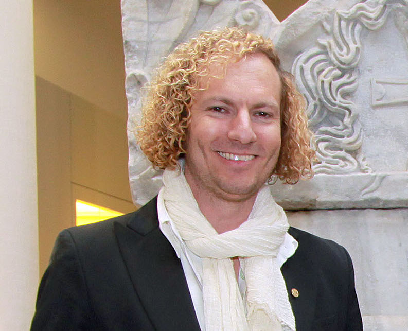 Die Staufer und Italien, Alexander Schubert